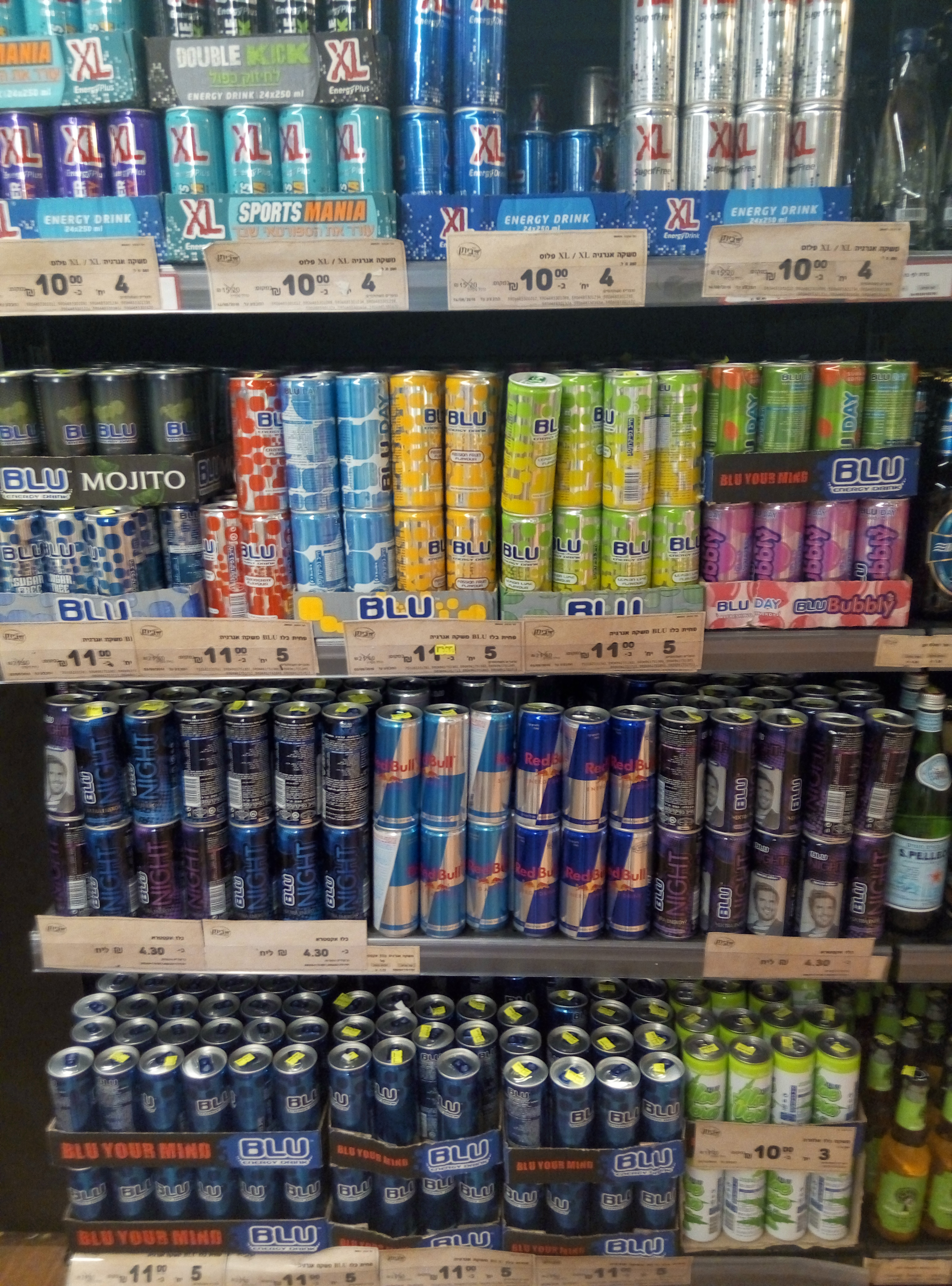 Enery Drinks -israel 2016